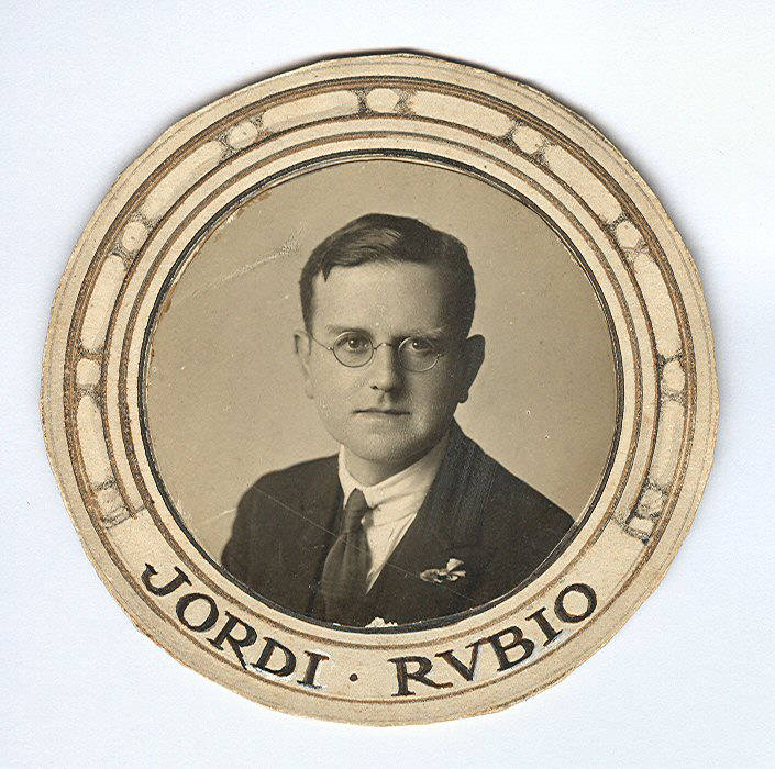 Retrat de Jordi Rubió i Balaguer, director de l'Escola de Bibliotecàries (1930-1939), i professor de Bibliologia (1915-1924), de Biblioteconomia (1916-1924), de Literatura catalana antiga (1920-1924) i de les pràctiques a biblioteques (1920-1939)